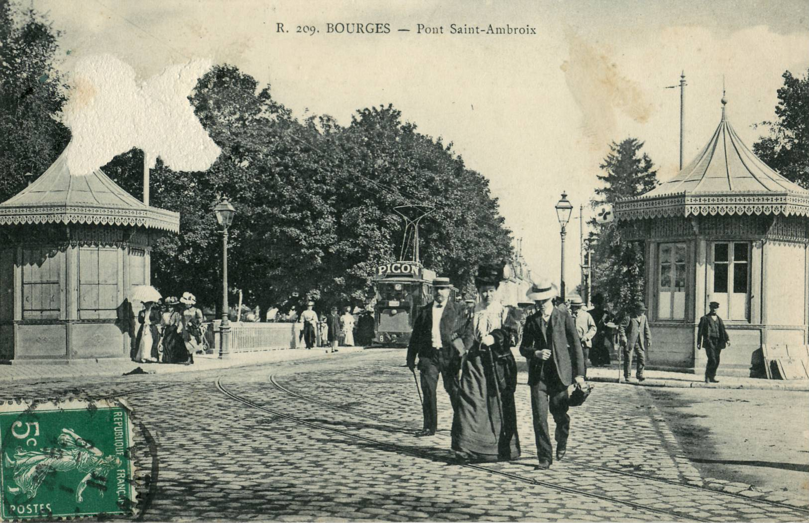 Carte postale ancienne, sans mention d'éditeur, n°R 209 : BOURGES - Pont Saint-Ambroix